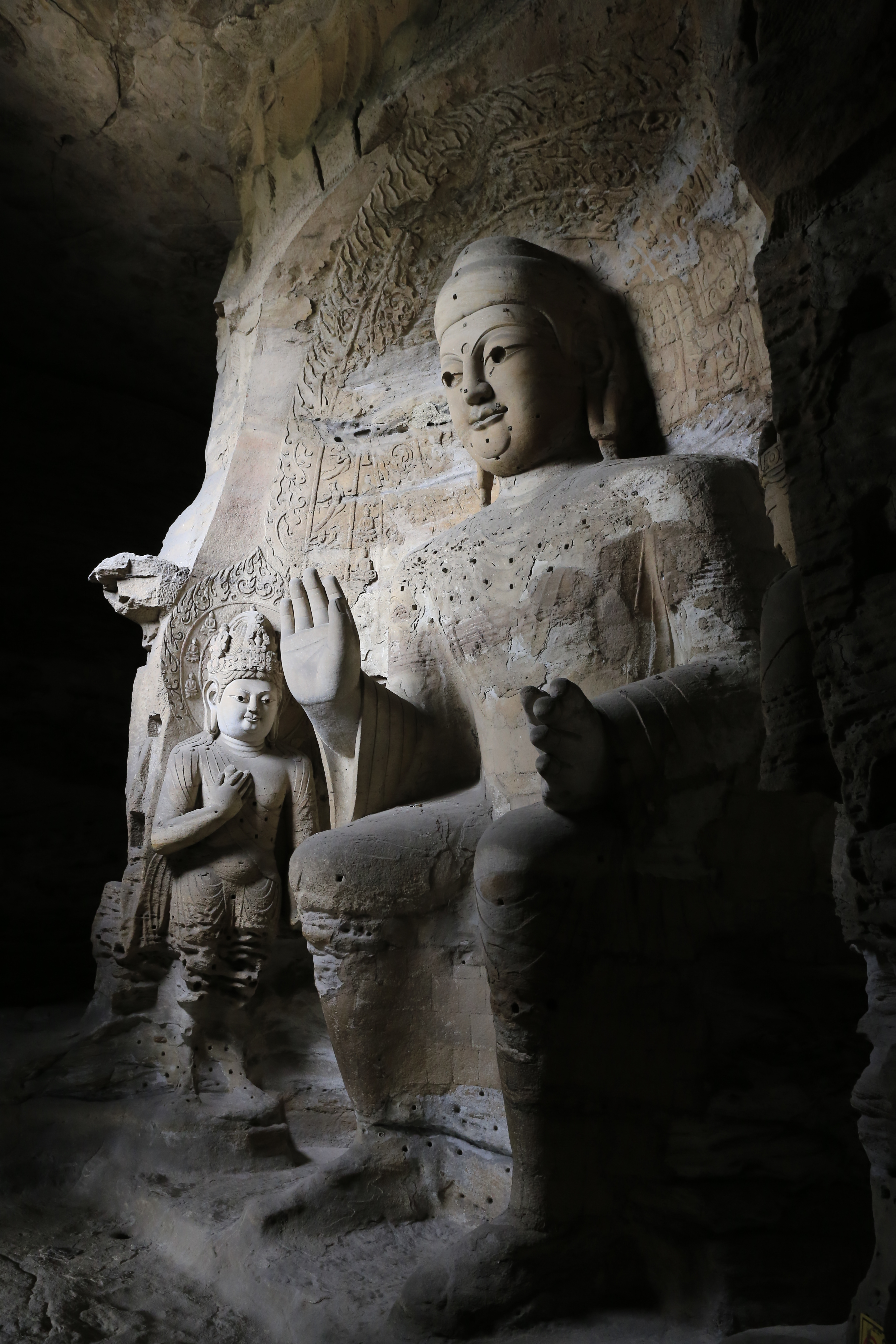 大同云冈石窟——第3窟